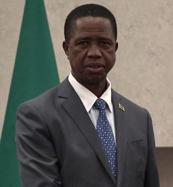 Президент Замбии Эдгар Лунгу.